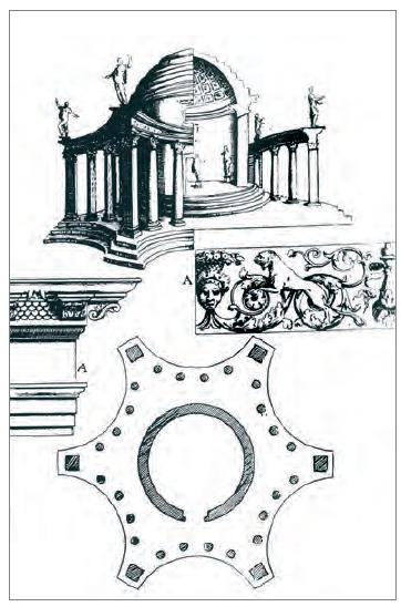 ricostruzione ipotetica di un tempietto di Tivoli